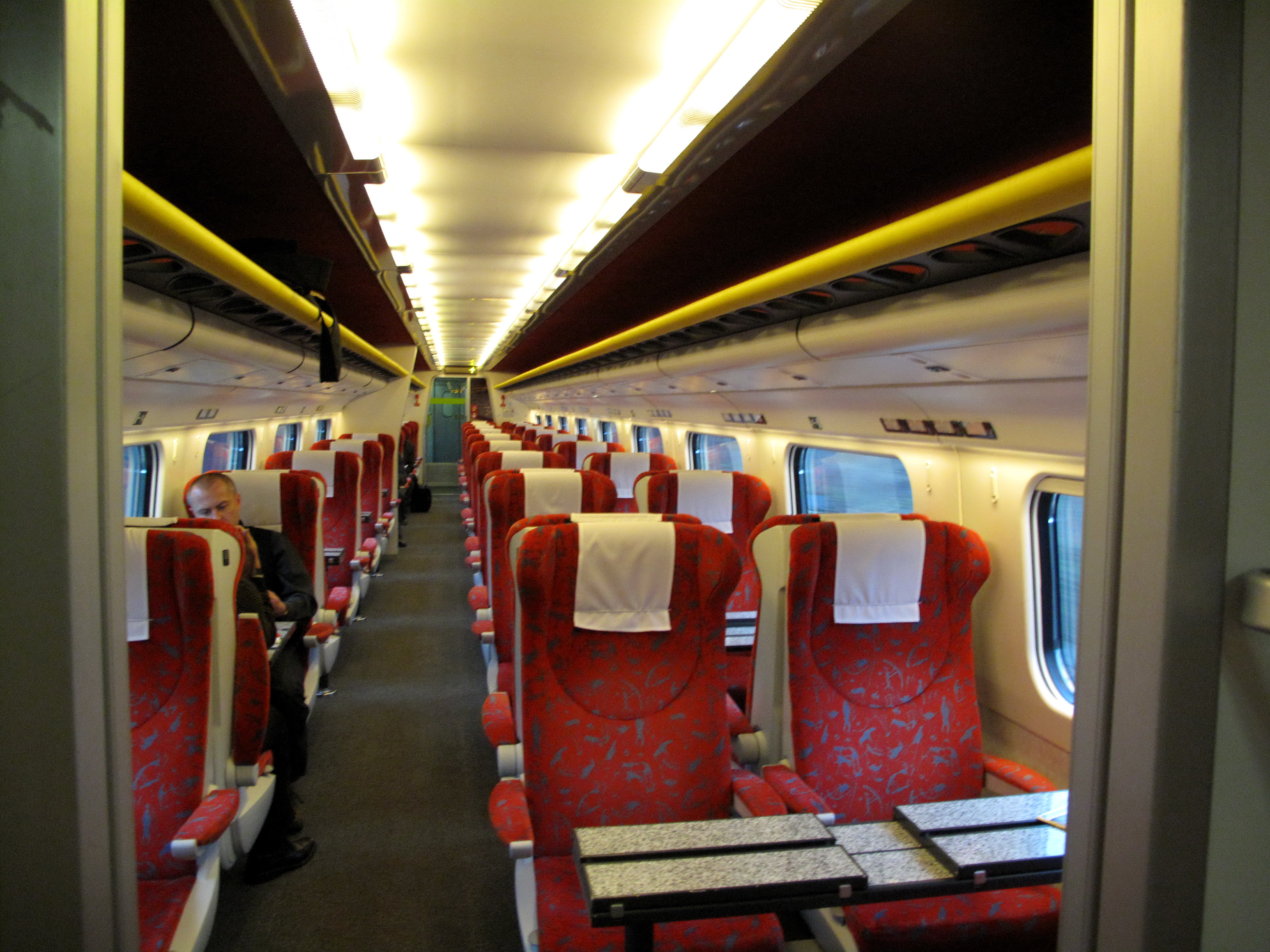 Pendolino, 1. třída